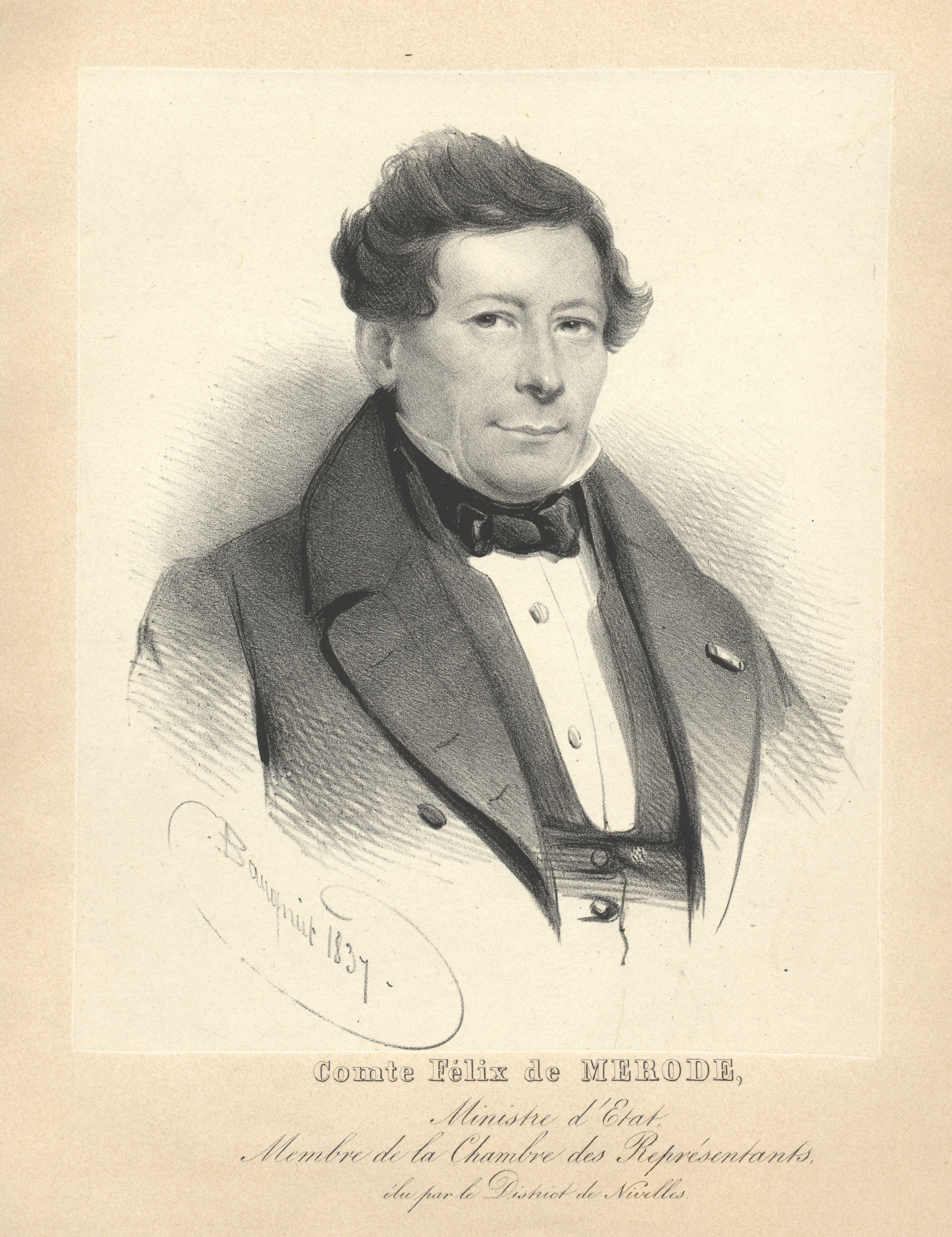 Portrait (lithographie) of Count Félix de Merode by Baugniet